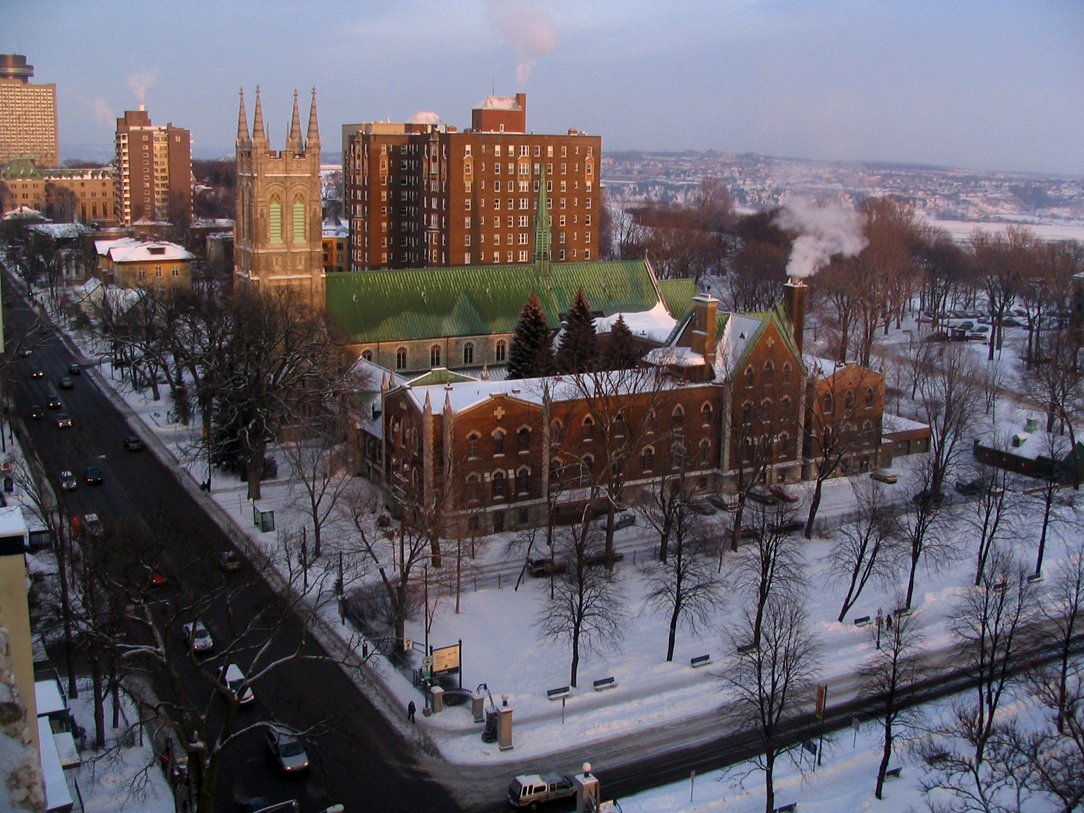 Vue du treizième étage sur la Grande-Allée, à Québec, et sur l'église Saint-Dominique et le monastère des Dominicains, sous la lumière du coucher de soleil froid de février. En arrière-plan: les glaces du fleuve Saint-Laurent et sa rive sud, Lévis. Le monastère, le bâtiment le plus rapproché sur la photo, a été démoli en 2012.